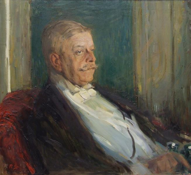 Depicted person: Nikolaus Graf von Seebach